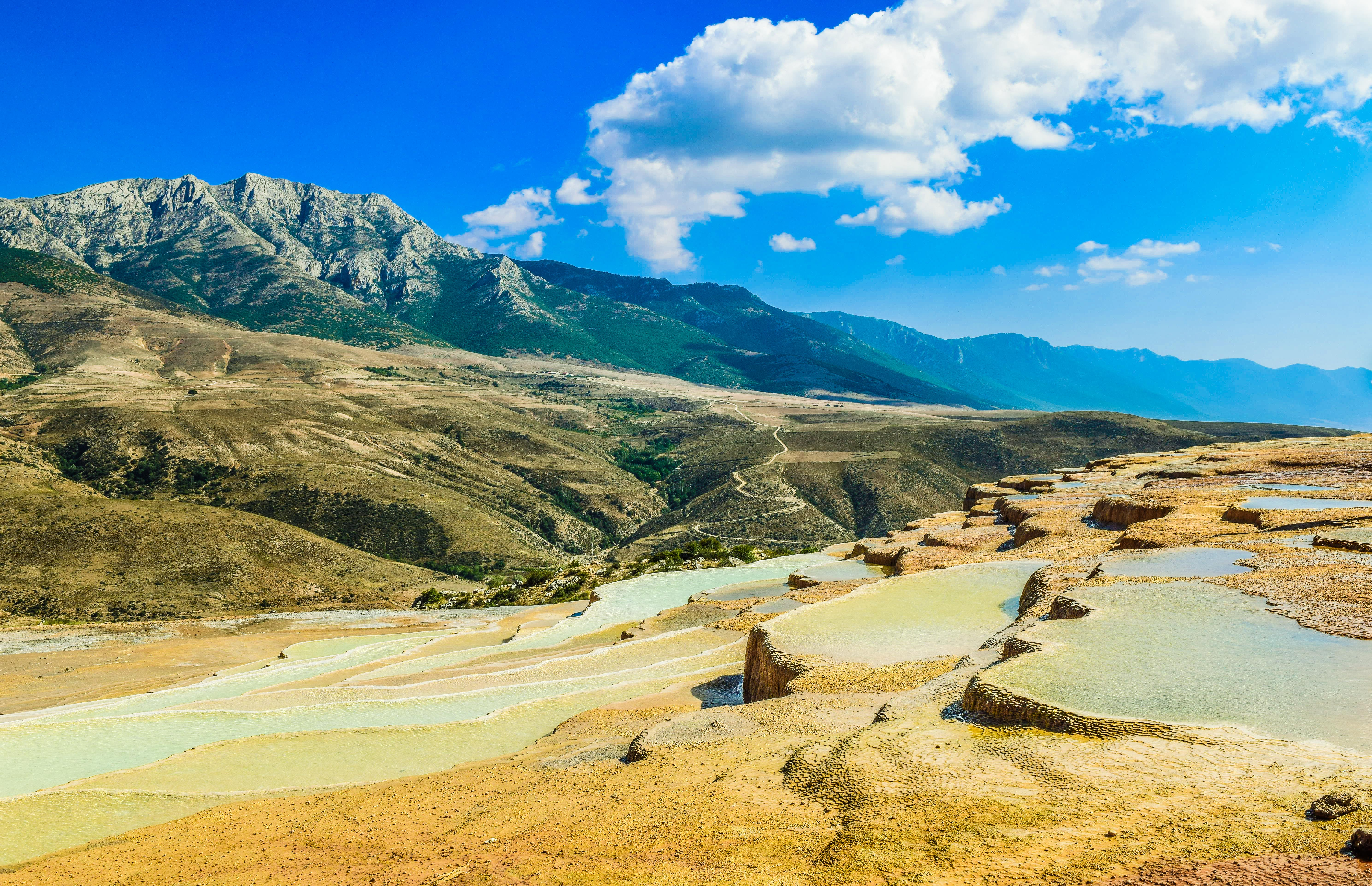 چشمه معدنی و پله کانی باداب سورت. تصویر: امیرحسین فراتی